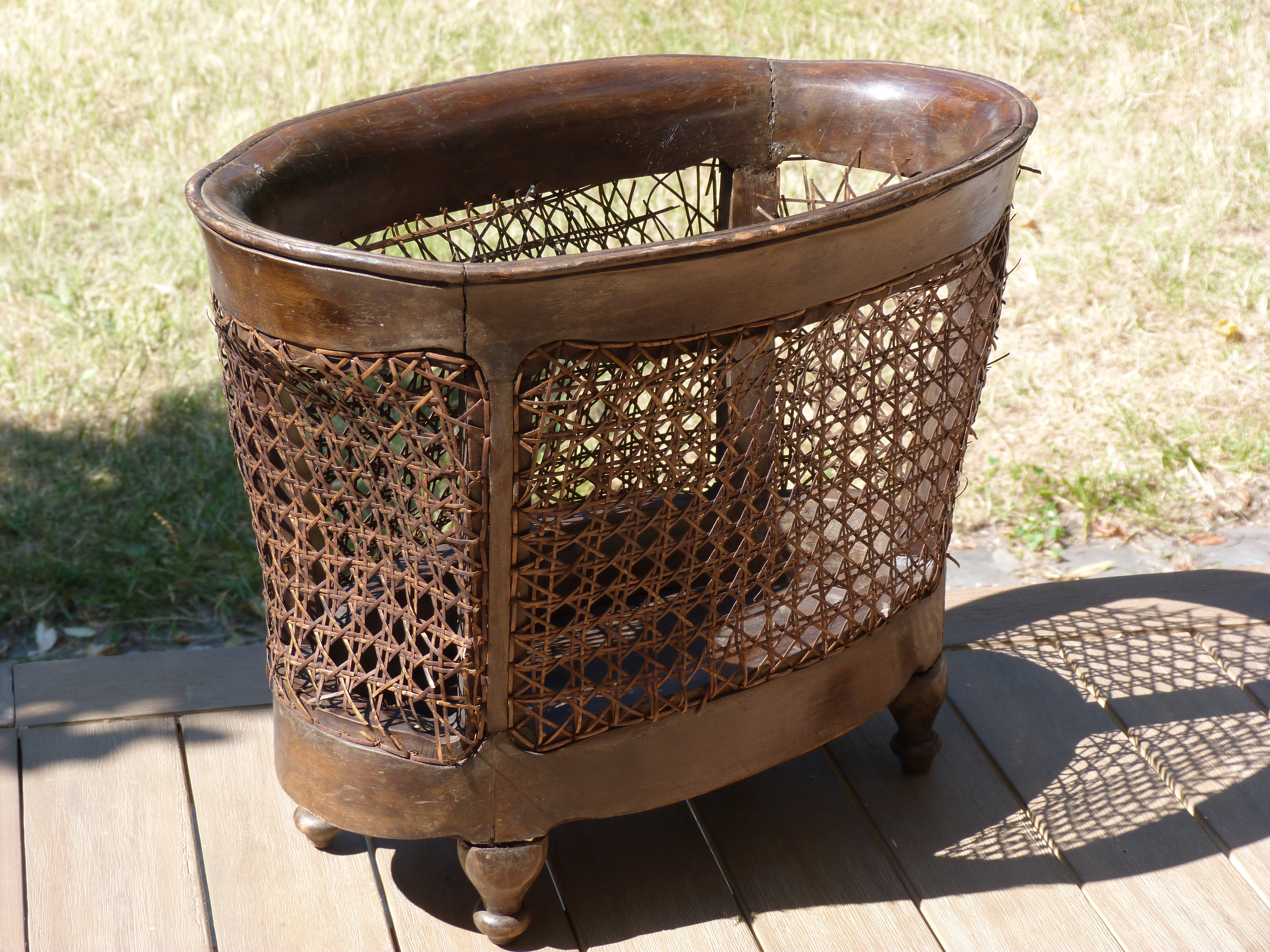 Újságtartó. Mérete: 36 cm x 46 cm. Fa, nád. ©© Derzsi Elekes Andor, Budapest, 2014, A kép egészben, vagy részletekben másolását, bármilyen úton történő sokszorosítását és felhasználását a szerző ellenérték nélkül, jogutódjaira is kihatóan megengedi. Az engedély kiterjed a kereskedelmi célú hasznosításra is. Kéri azonban nevének feltüntetését a felhasználás során. A Metapolisz sorozat valamennyi képe és filmje Creative Commons alatti valamint kereskedelmi - for profit - célra is felhasználható. Ajánlott hivatkozás: Derzsi Elekes Andor: Metapolisz DVD line